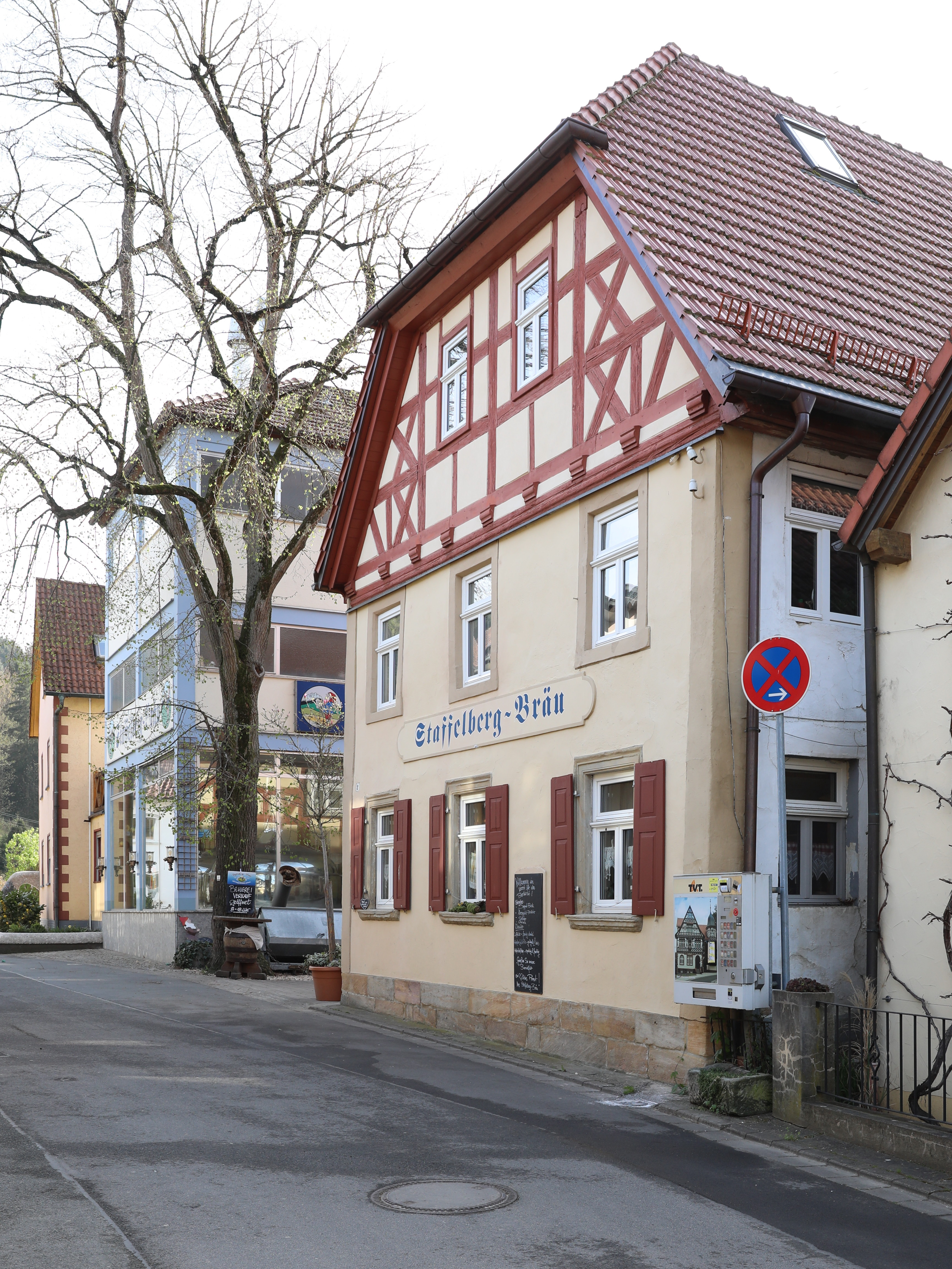 Staffelbergbräu in Loffeld, Bad Staffelstein